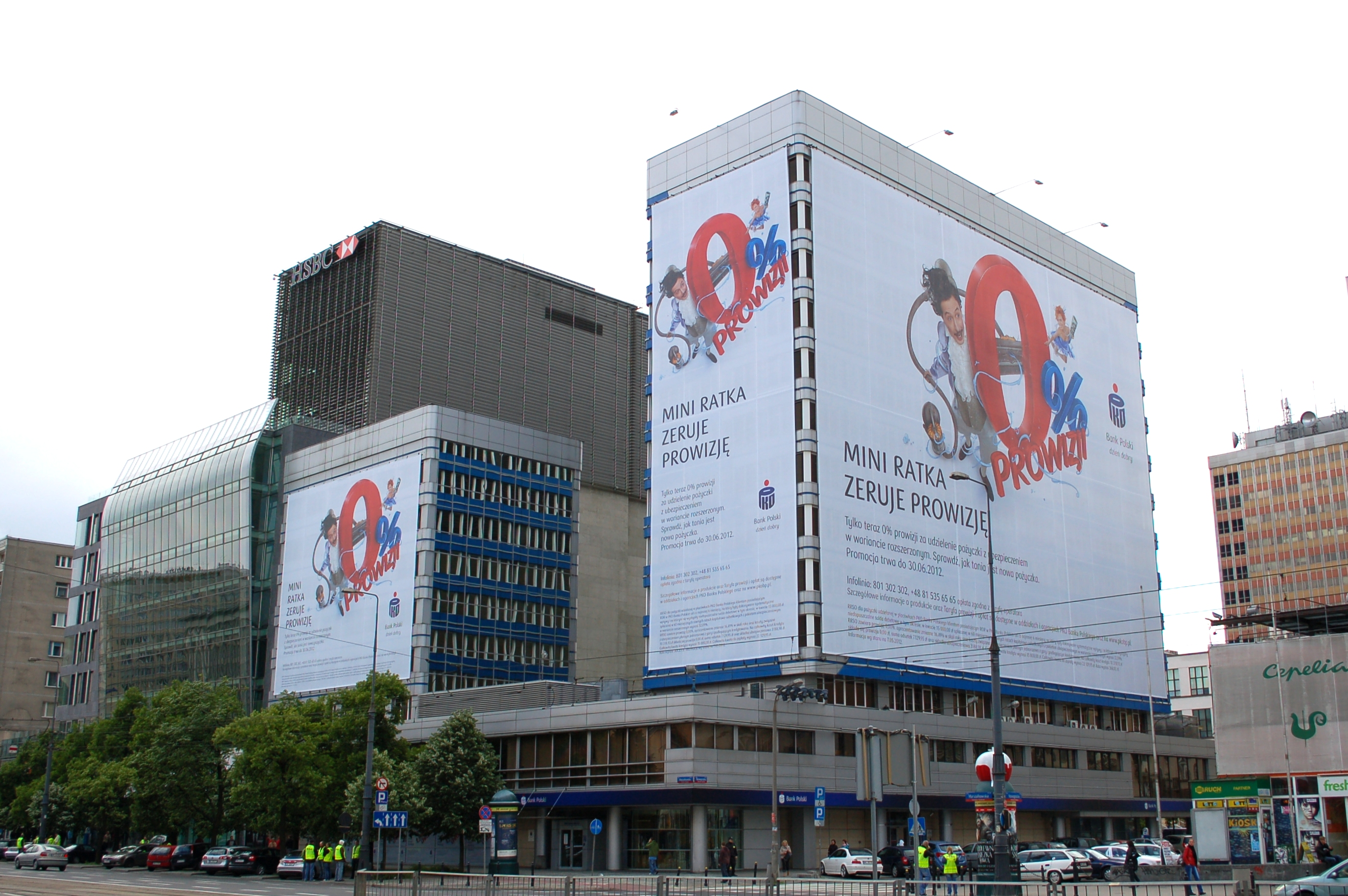 Warschau, Marszalkowska